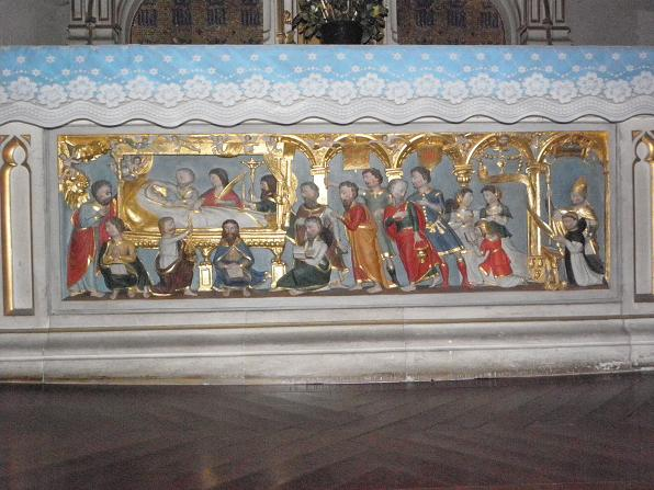 Bas-relief de la mort de la Vierge de l'église Saint-Pierre d'Épiniac (35).